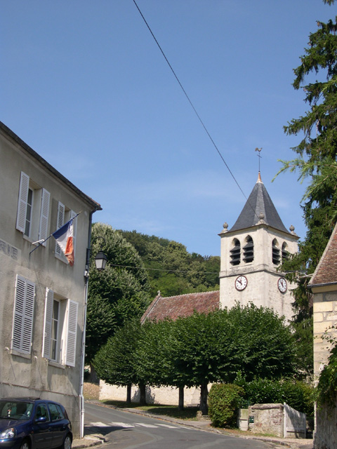 Ronquerolles (Val d'Oise) : la mairie et l'église